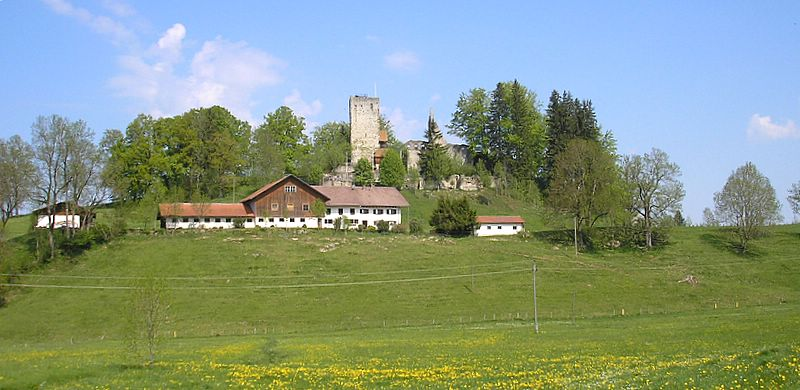 Burg Sulzberg (Markt Sulzberg, Landkreis Oberallgäu, Bayerisch-Schwaben). Gesamtansicht von Südosten. Eigene Aufnahme, Mai 2008 / Sulzberg castle near Sulzberg (Landkreis Oberallgäu, Bavaria, Germany). Total view from the south east. Own photo, May 2008